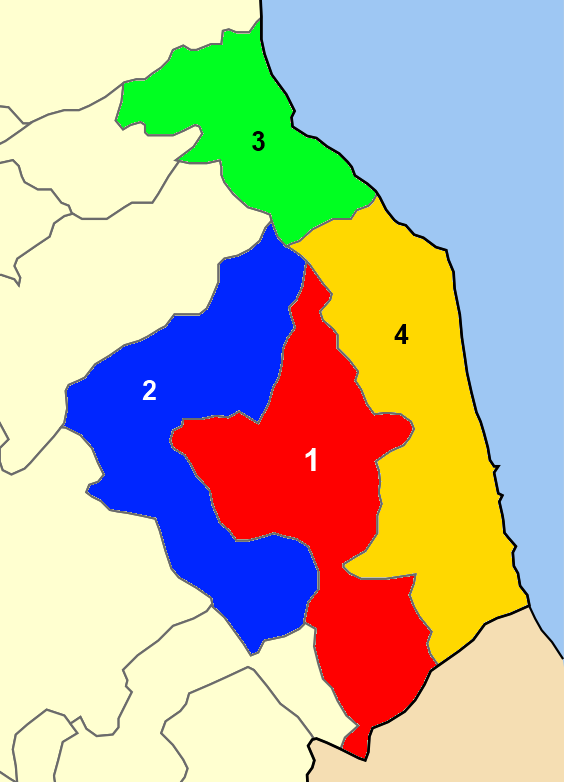 Χάρτης των ενοτήτων (και πρώην δήμων) από τις οποίες αποτελείται ο Δήμος Αγιάς